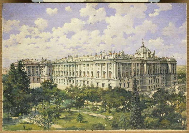 Der königliche Palast in Madrid (El Palacio Real en Madrid). Óleo sobre cartón